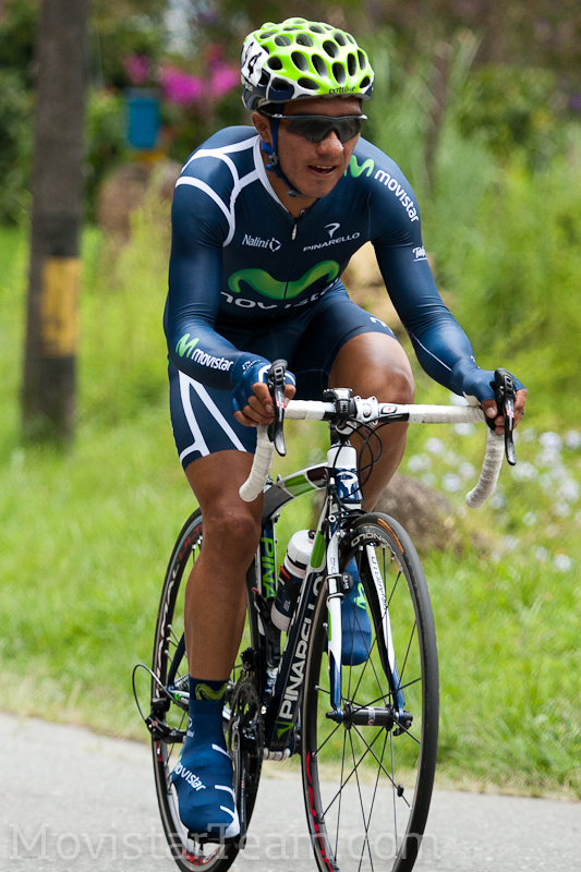 Byron Guamá. Vuelta a Antioquia 2011